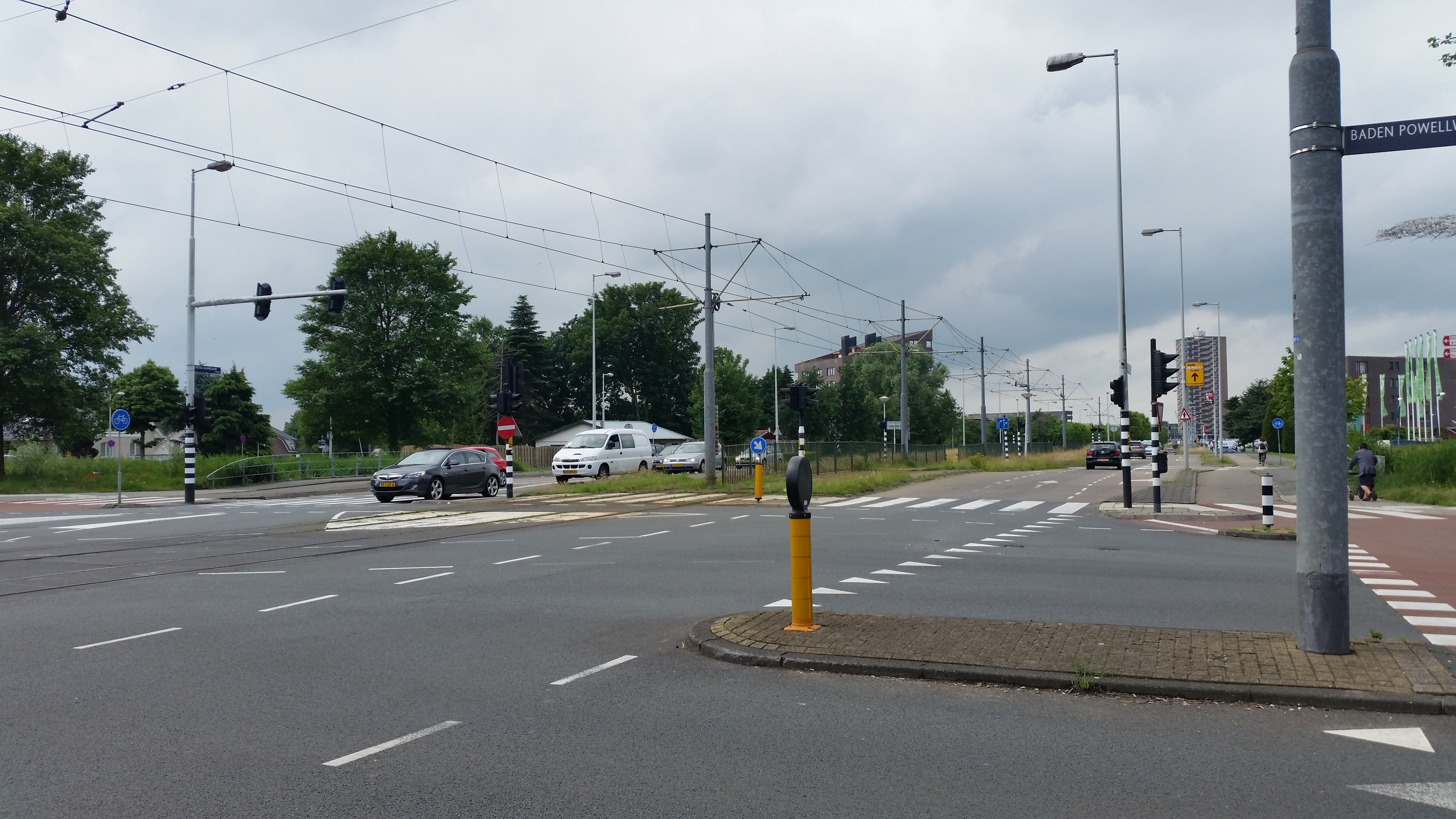 Overzicht van Brug 1886 (in Amsterdam)